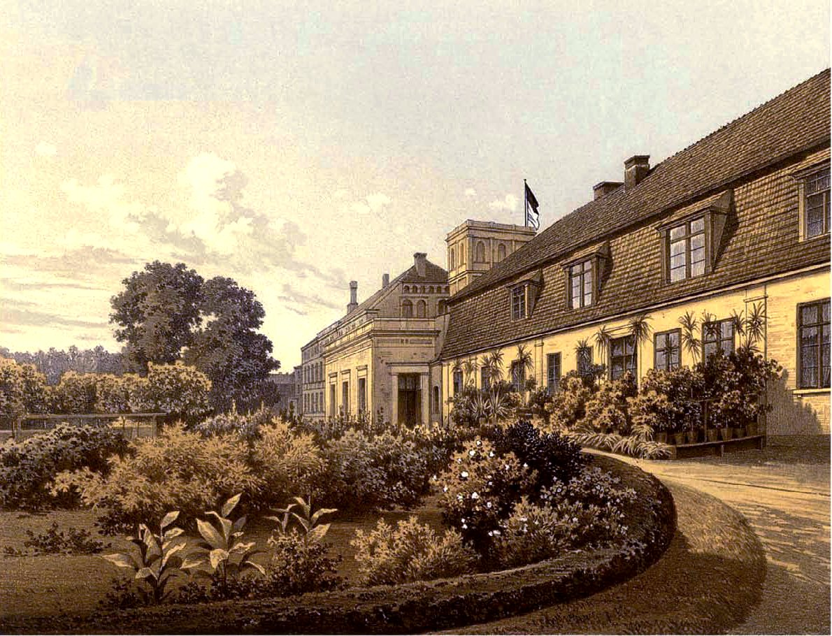 Rittergut Zezenow, Kreis Stolp